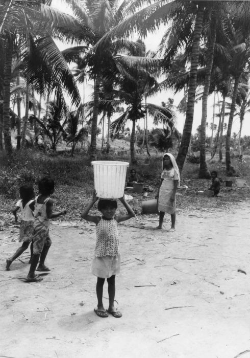 Negatief. Een meisje met een emmer water op het hoofd in het dorp Kandar